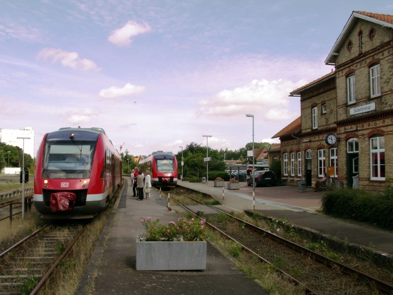 Bahnhof Süderbrarup